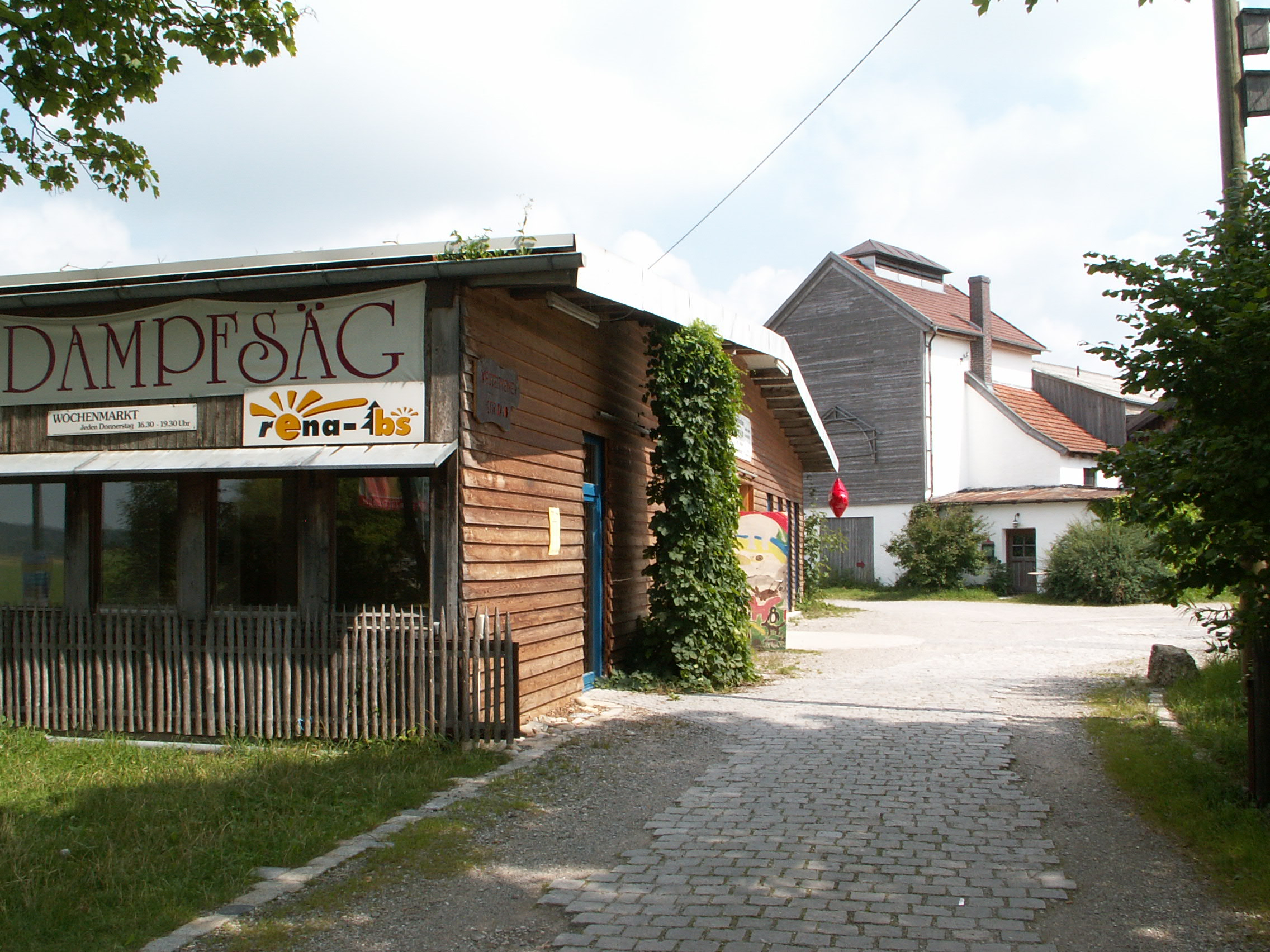 Dampfsäg in Sontheim (Unterallgäu)